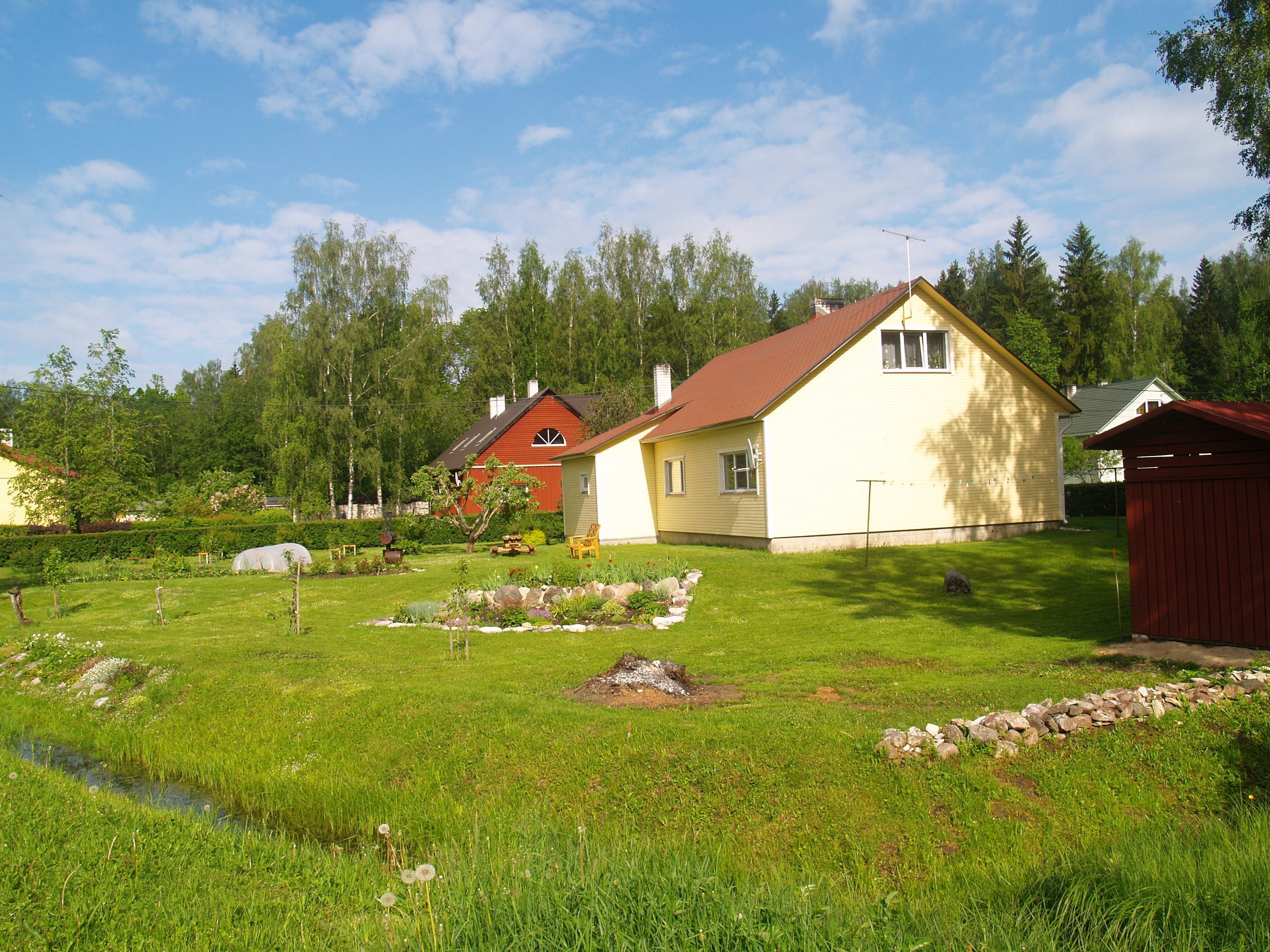 Kurista küla